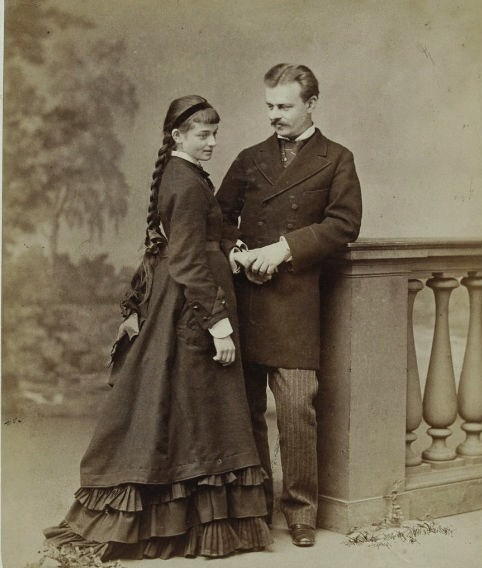 Portret Artura Potockiego i Róży z Lubomirskich Potockiej